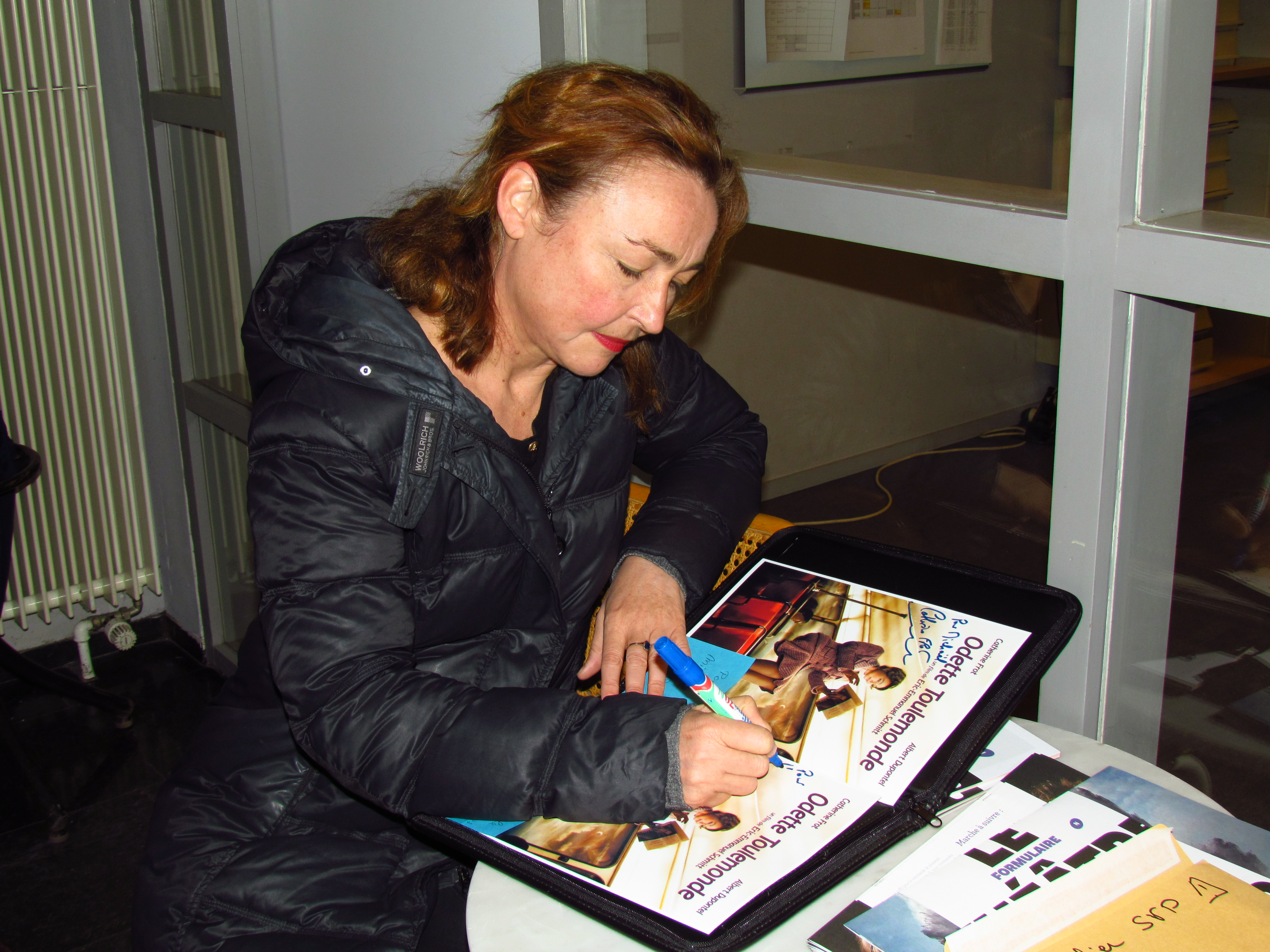 Catherine Frot signant une dédicace en 2012.